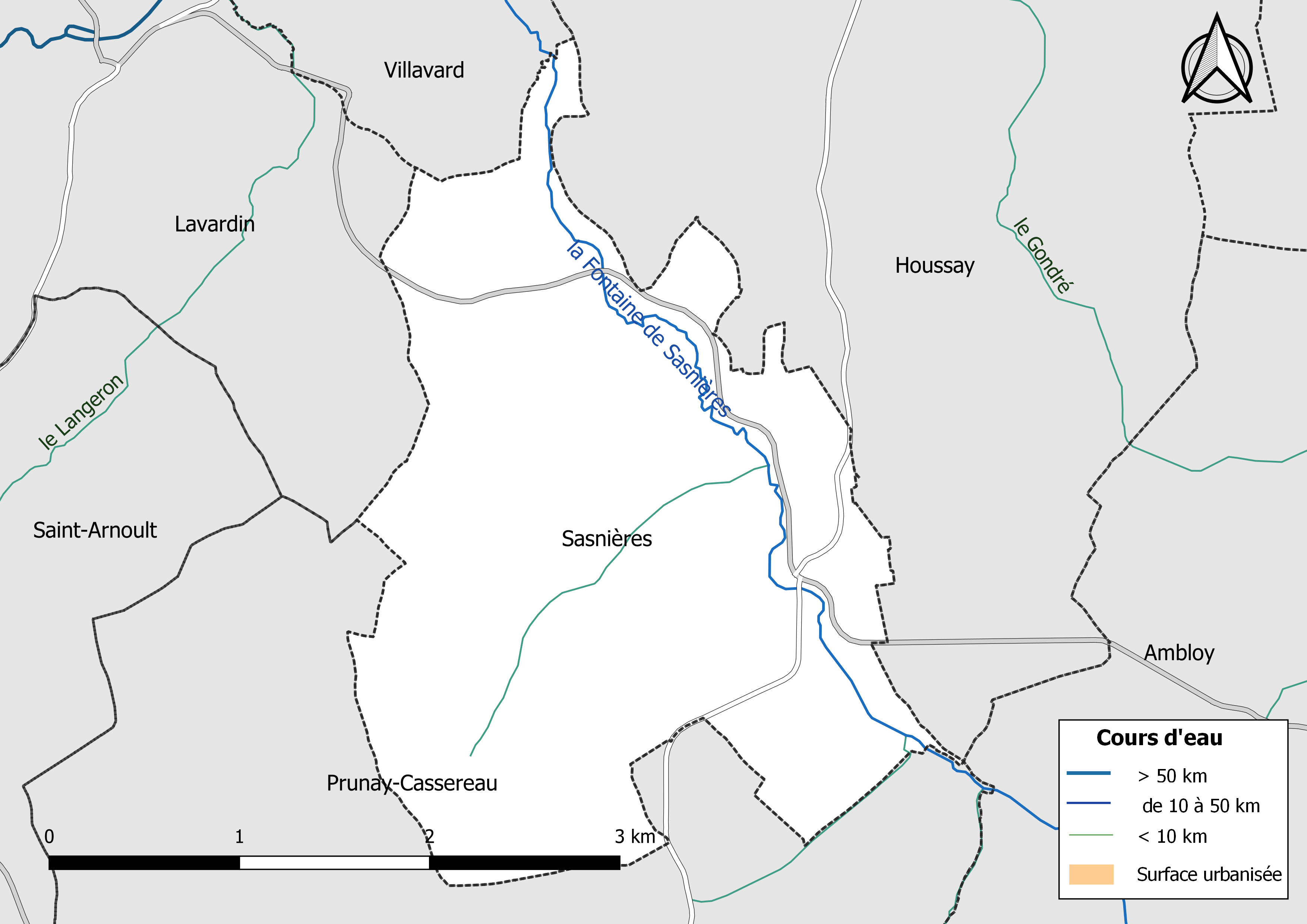 Carte du réseau hydrographique de la commune de Sasnières (Loir-et-Cher, France).